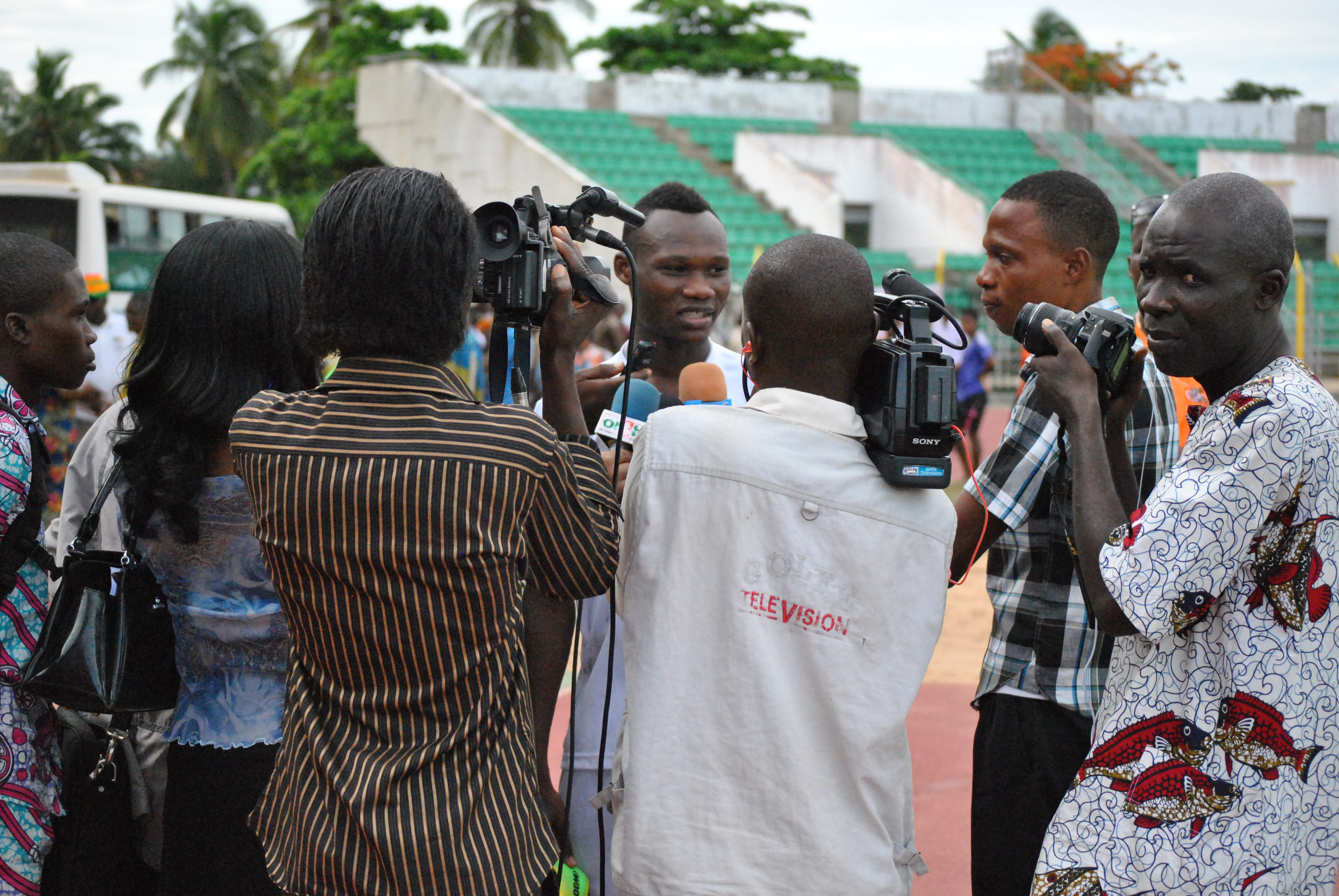 Désiré Sègbè Azankpo est né le 6 Mai 1993 au Bénin. Du haut de ses 21 ans, il est international béninois depuis le 17 Mai 2014. Ses prouesses techniques, ses conduites de balle, sa puissant athlétique, sa lourde frappe, sa pointe de vitesse phénoménale et ses passements de jambes hors pairs ont poussés le nouveau sélectionneur des Ecureuils du Bénin, Ollé-Nicole, a lui confié la pointe de l’attaque de l’équipe nationale du Bénin aux côtés de Stéphane Sessegnon et Razack Omotoyossi. Parcours Professionnel : 2013-2014: Fc Metz contrat pro et jeunesse d'esch (du 31 Janvier au 31 Mai) 2012-2013: Fc Metz contrat stagiaire. 2011-2012: Fc Metz contrat stagiaire. 2010-2011: Génération Foot de Dakar (ligue 2 professionnelle) 2009-2010: Génération Foot de Dakar (Champion de National 1) 2008-2009: Bénin Foot Académie.